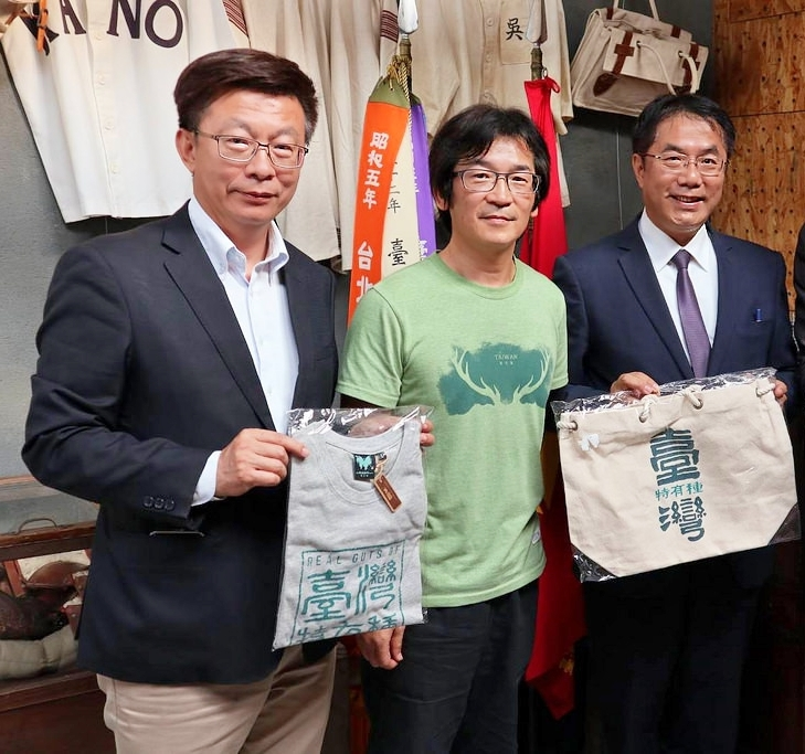 台南特有種商行魏德聖與黃偉哲見面。由左至右為郭國文（前勞動部次長）、魏德聖（熱蘭遮公司負責人）、黃偉哲（立法委員）